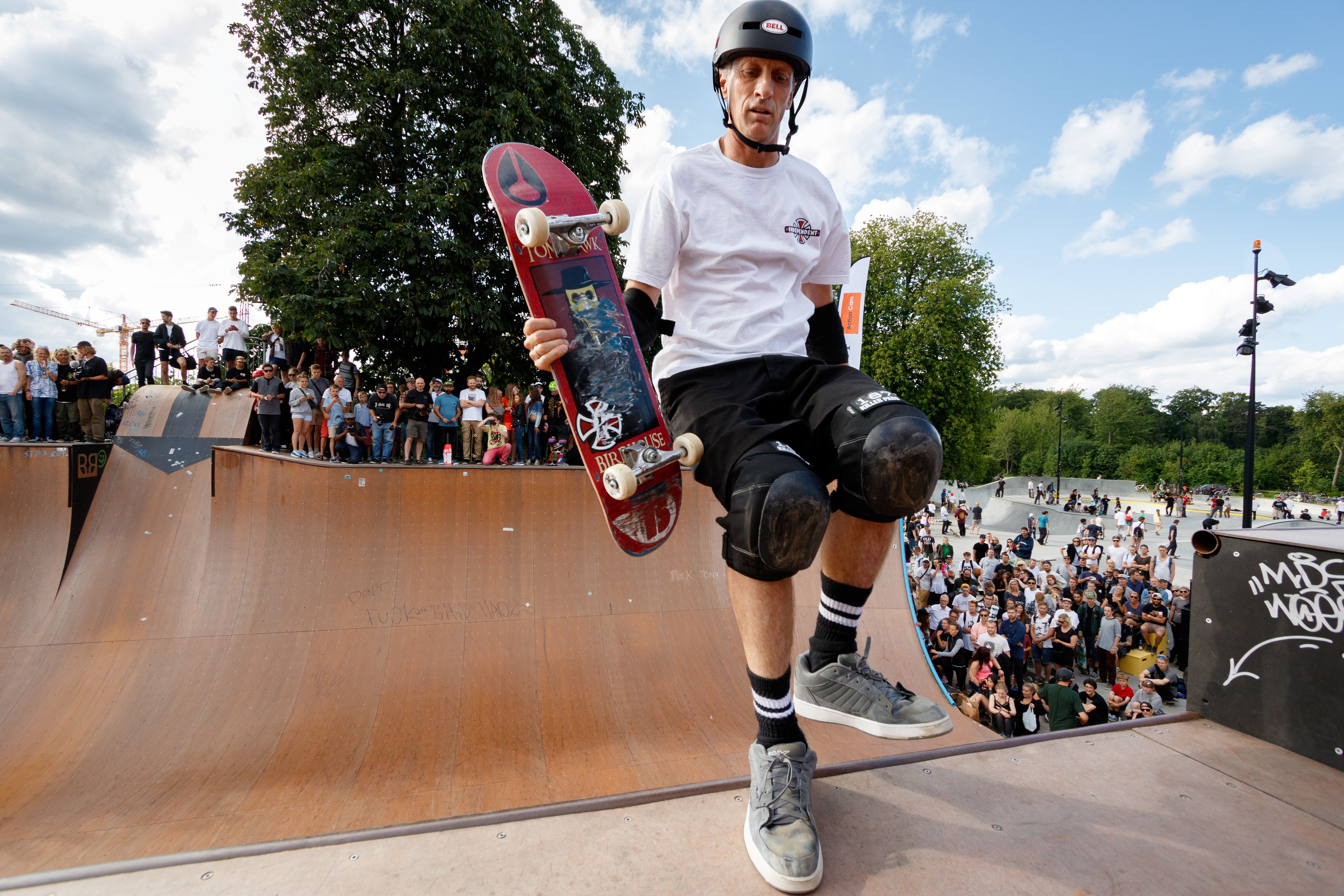 Tony Hawk in Fælledparken Skatepark, Copenhagen, Denmark, 2015